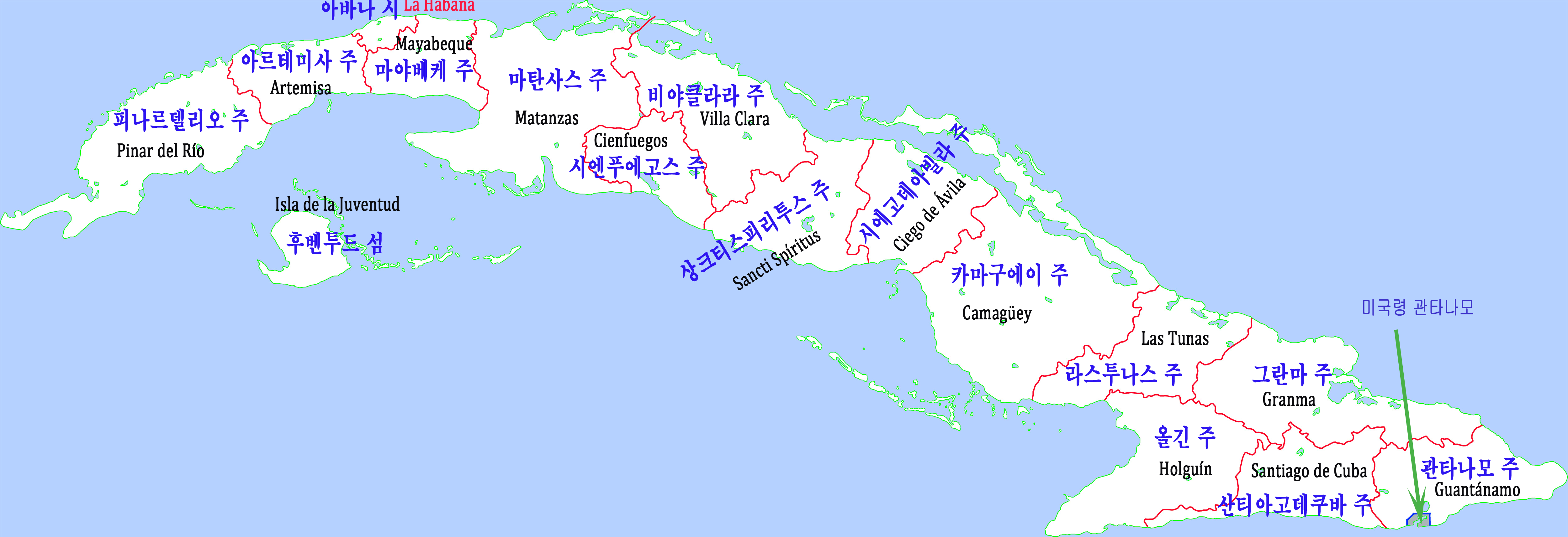 쿠바 행정구역